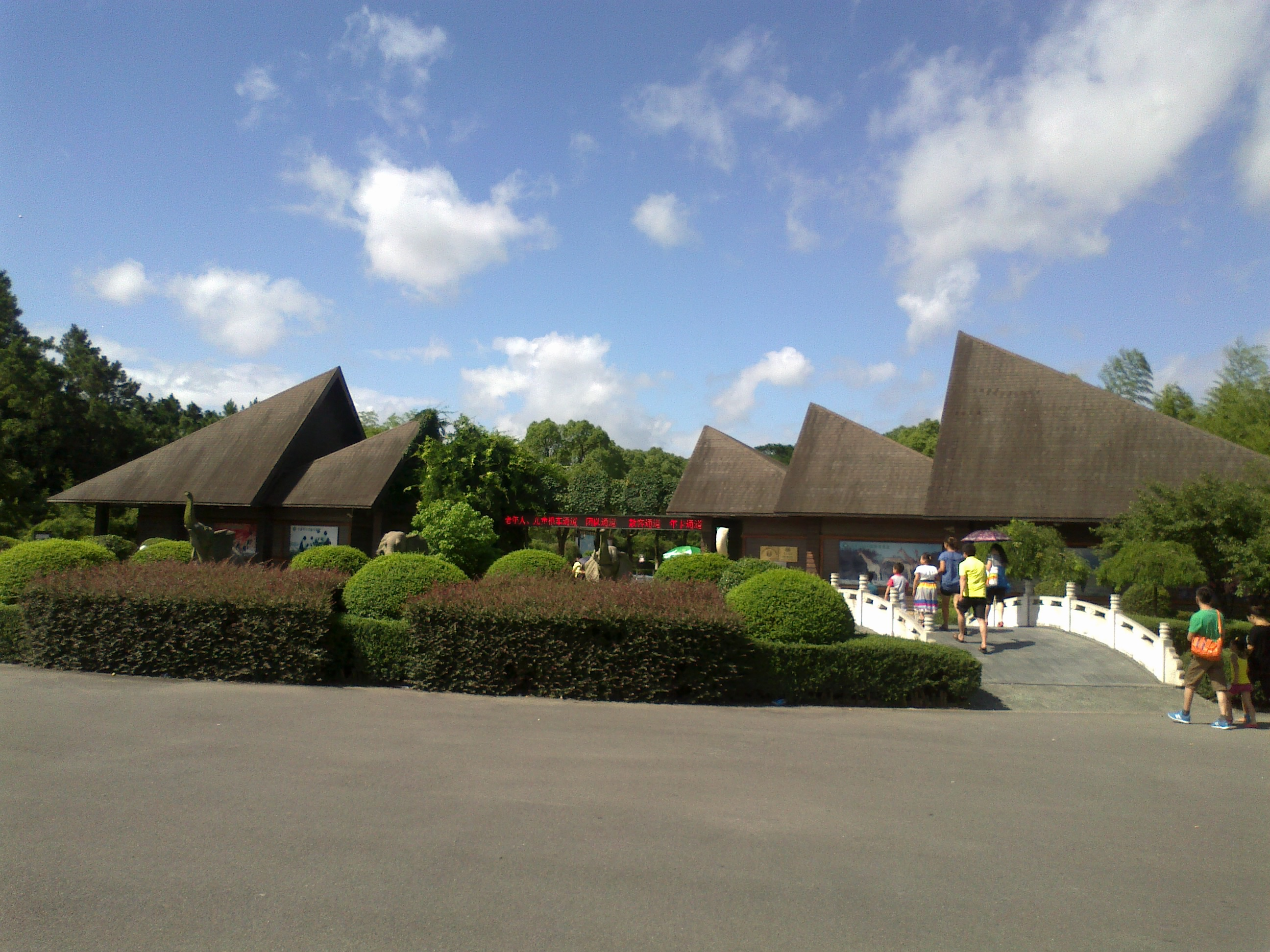 中文（中国大陆）: 宁波雅戈尔动物园正门